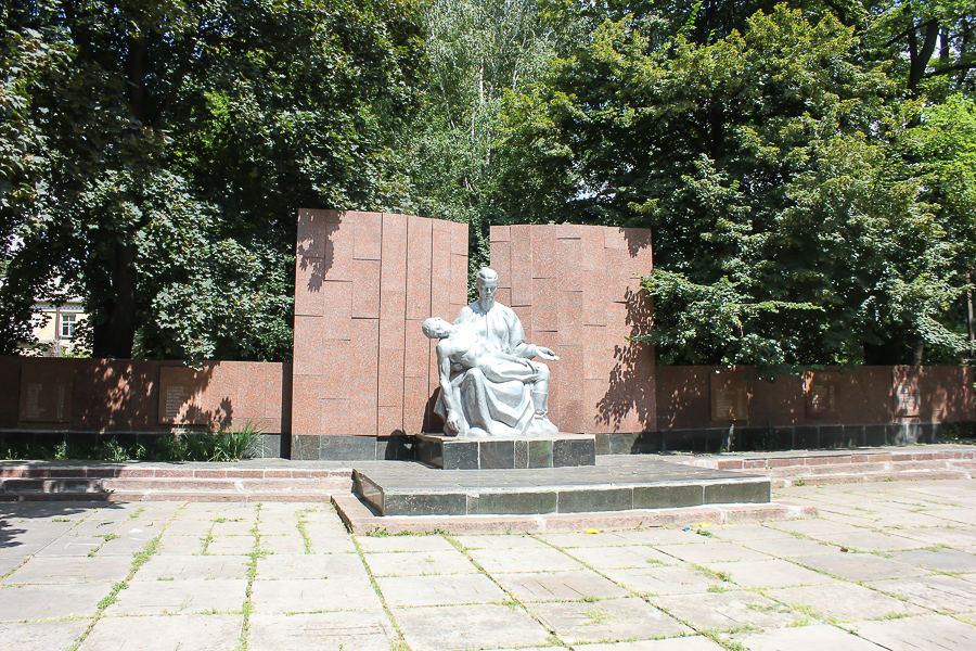 Меморіал в Узині